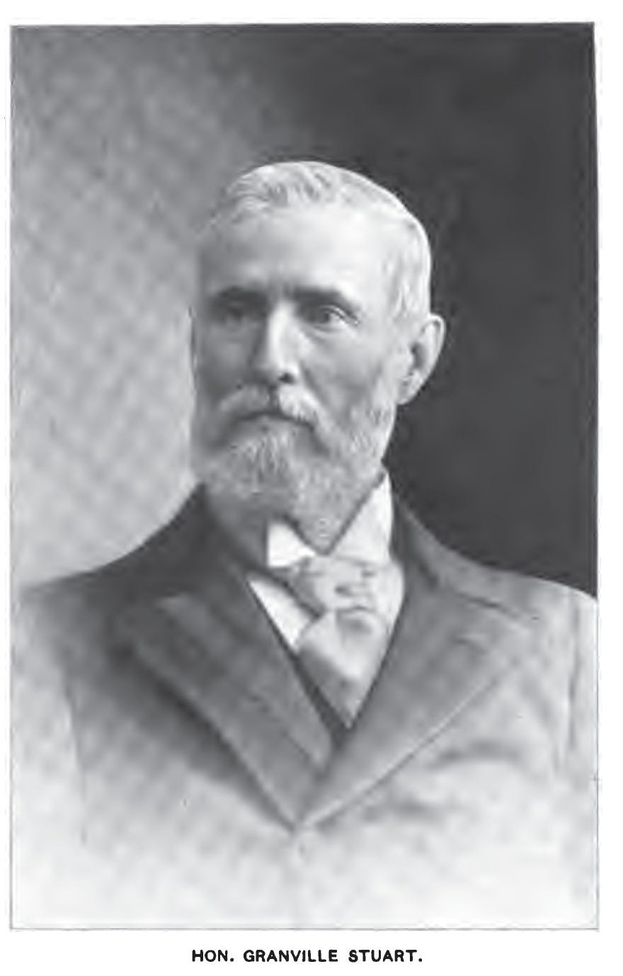 Granville Stuart, Montana Pioneer, circa 1900